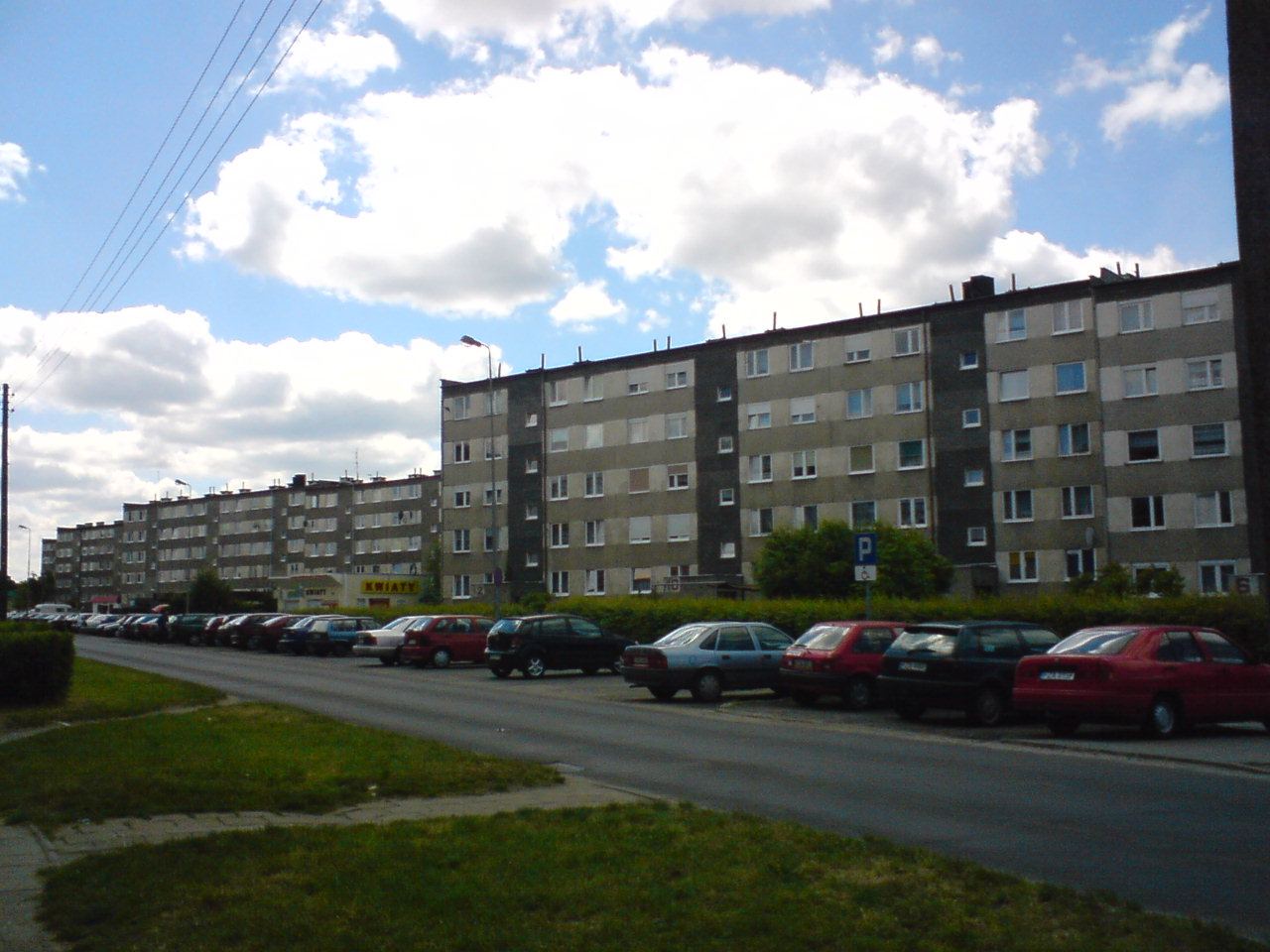 Osiedle Na Zatorzu (Męczenników Oświęcimskich Str.), Zatorze, Żary